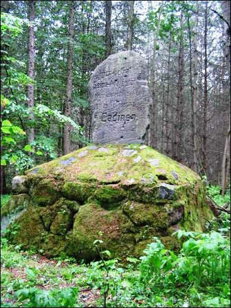 Kamień Cesarski w Pagórkach - postawiony dla upamiętnienia przejazdu cesarza Wilhelma II